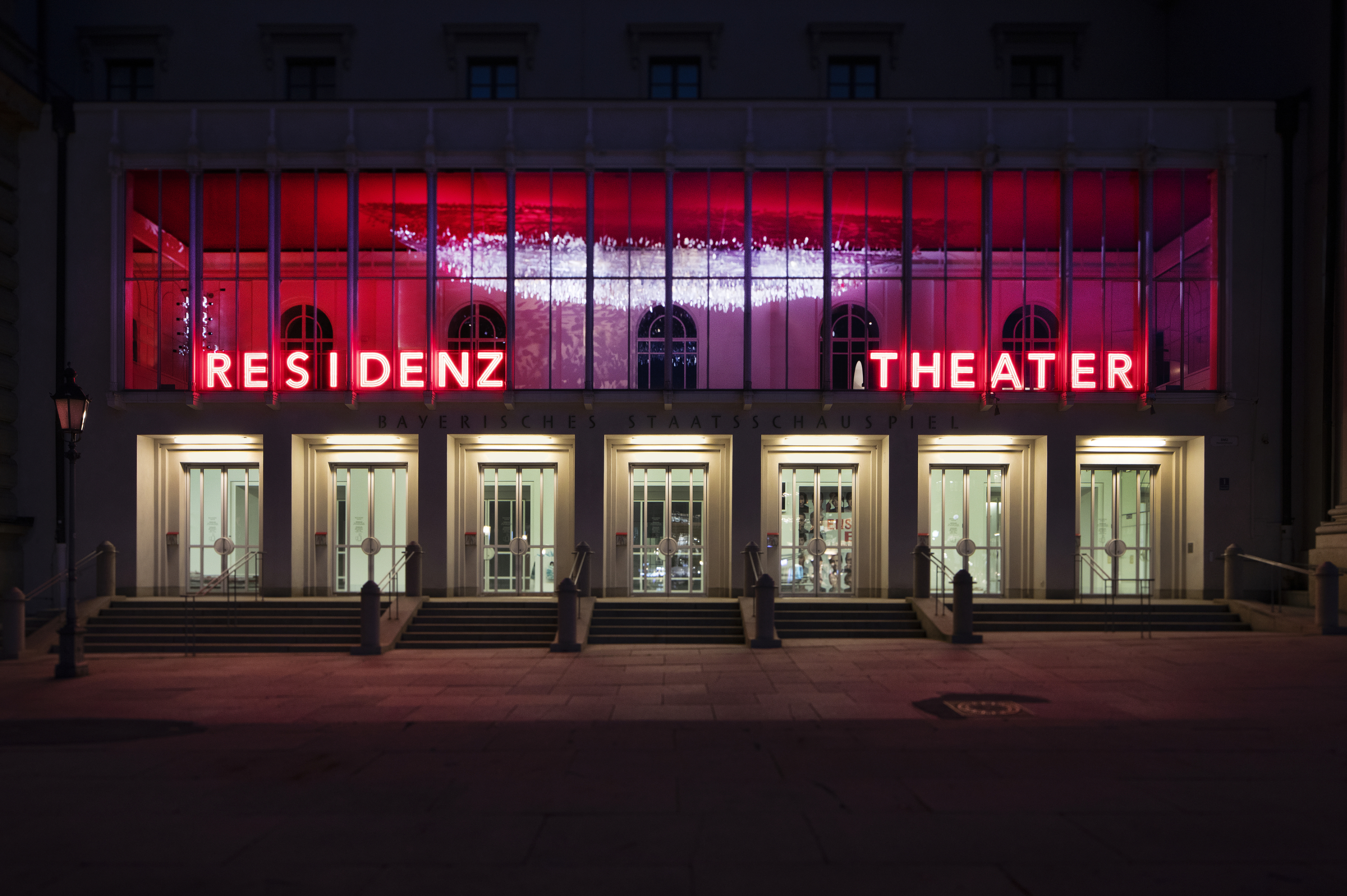 Fassade des Residenztheaters 2019, Foto: Simon Koy